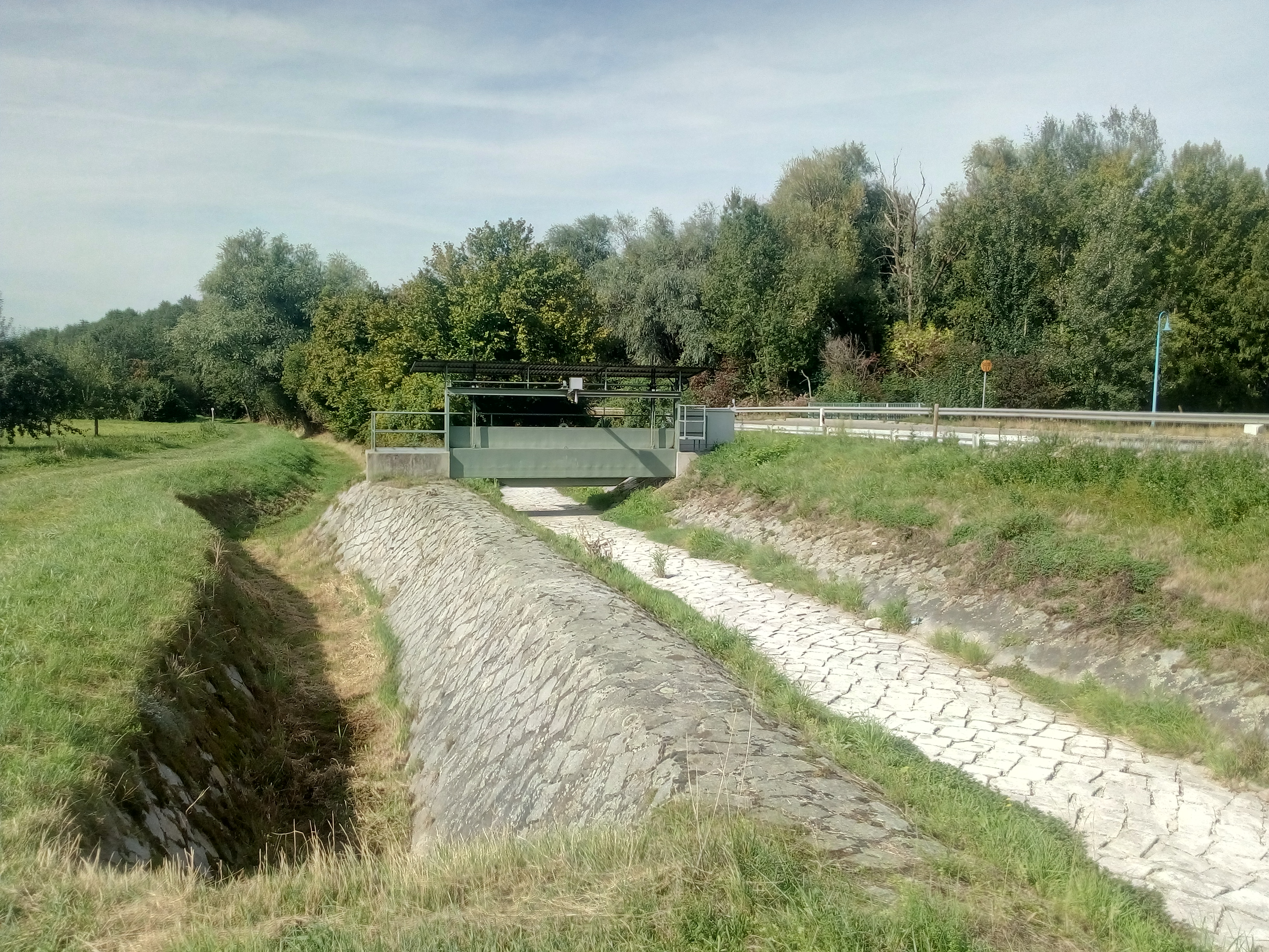 Abzweig des Steinbach-Flutkanals vom Steinbach beim Gewerbegebiet des Ortsteils Steinbach der Stadt Baden-Baden